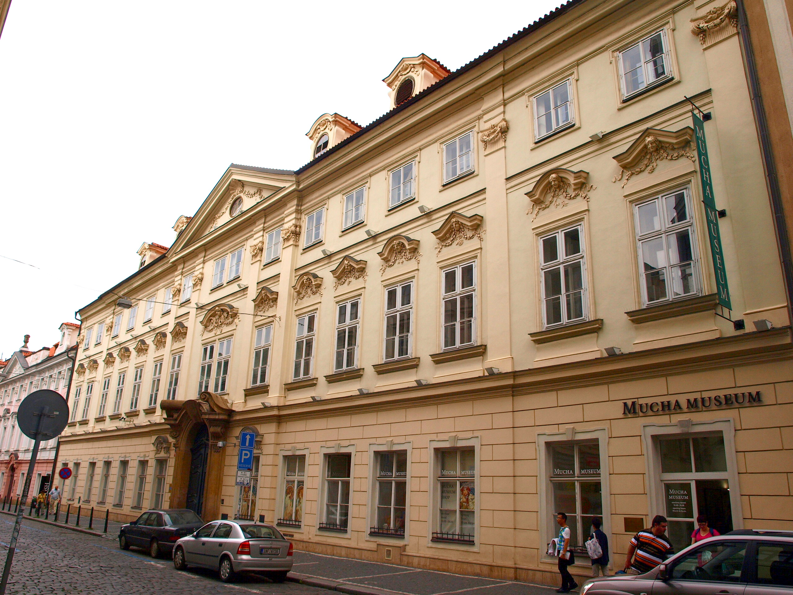 Kaunický palác Panská 7.